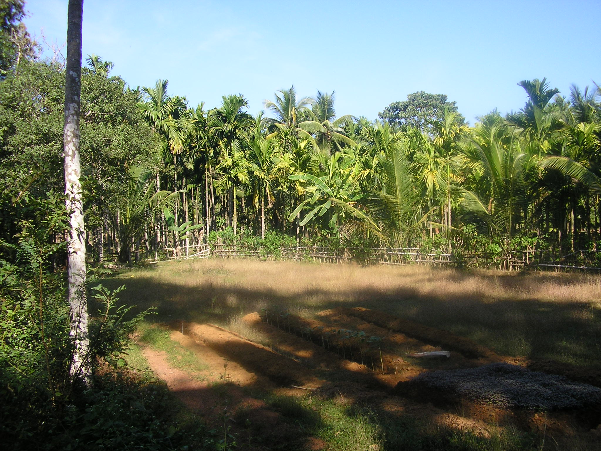 Tulu Nadu Landscape